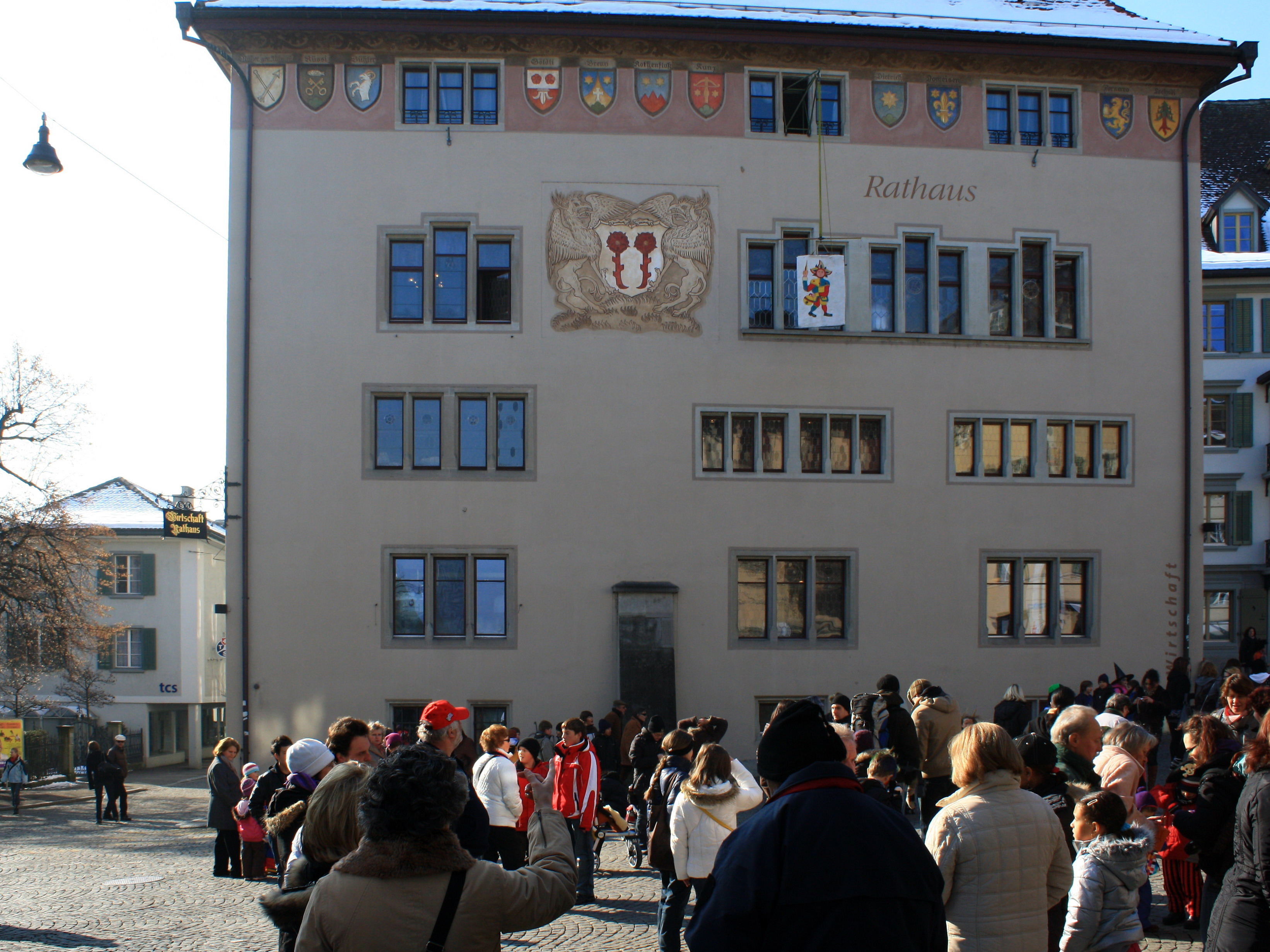 Eis-zwei-Geissebei at Rathaus on Hauptplatz in Rapperswil (Switzerland)